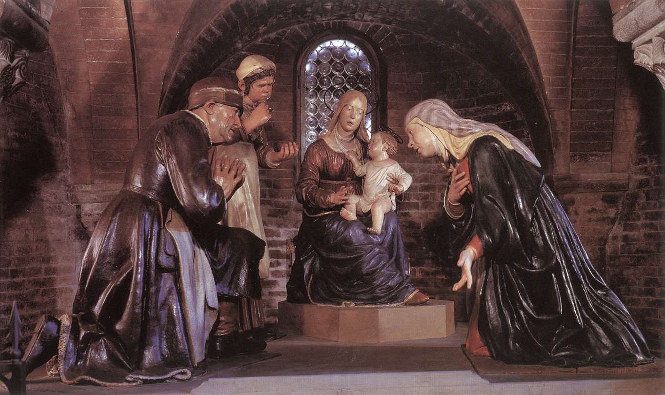 life-size